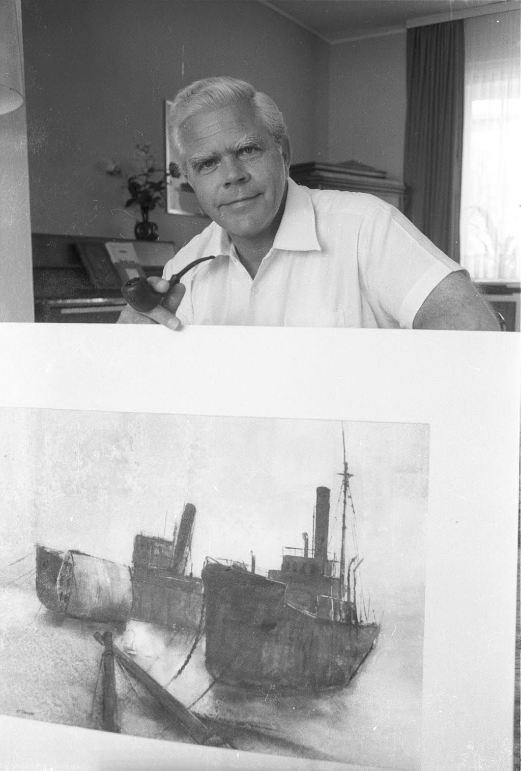 ist auch als "der malende Lotse" bekannt. Das bevorzugte Motiv des Hobbymalers sind Schiffe.